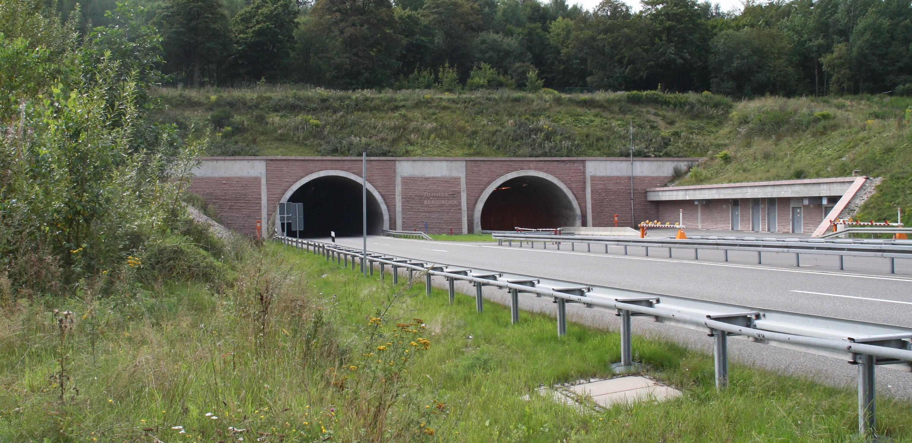 Tunnel Berg Bock nördliches Portal, Bundesautobahn 71 bei Suhl in Thüringen